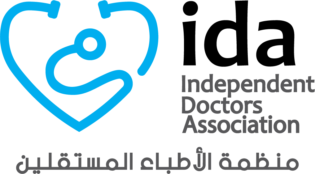 شعار المنظمة